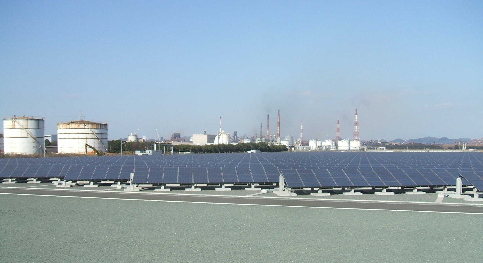 広島県福山市箕沖町にある中国電力福山太陽光発電所の北西側パネル